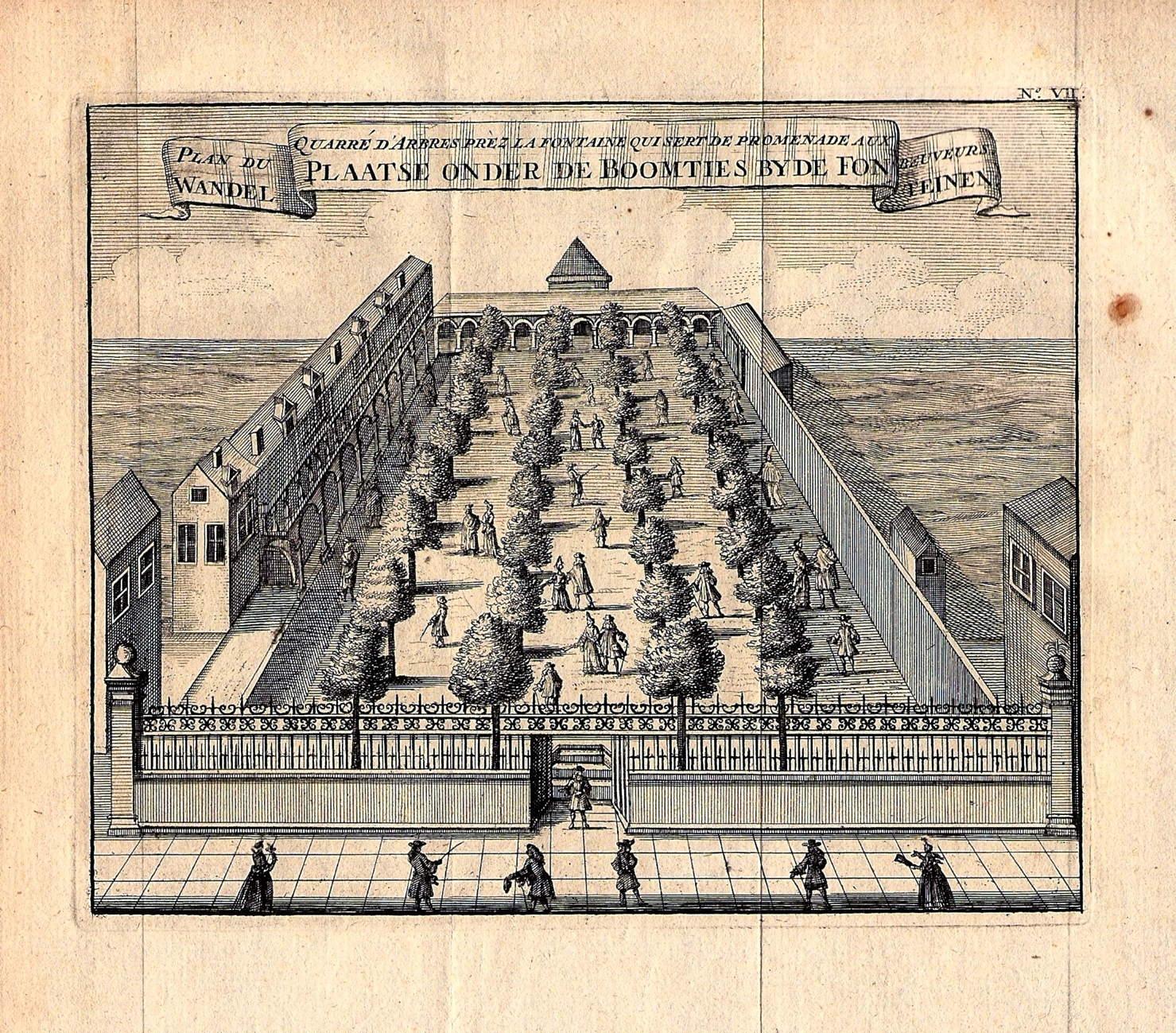 Der Kurhausgarten hinter der Komphausbadstrasse und der Alten Redoute, Kupferstich aus Amusemens des eaux d’Aix la Chapelle, Band 1, Tafel 7 von Karl-Ludwig Pöllnitz, 1736